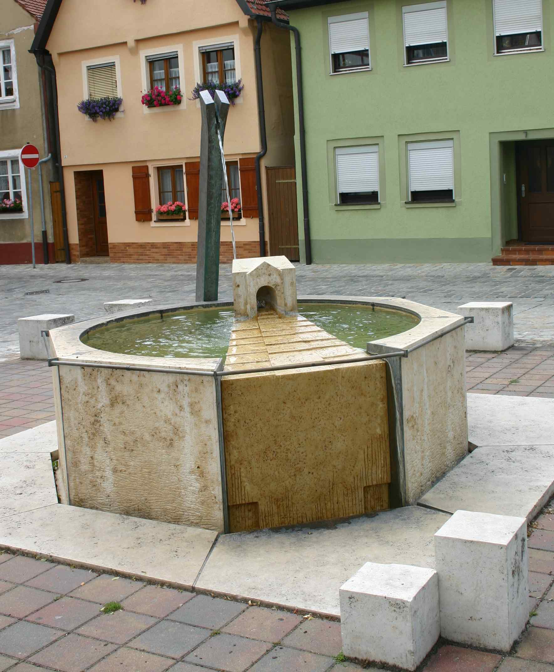 Milleniumsbrunnen Weißenburg